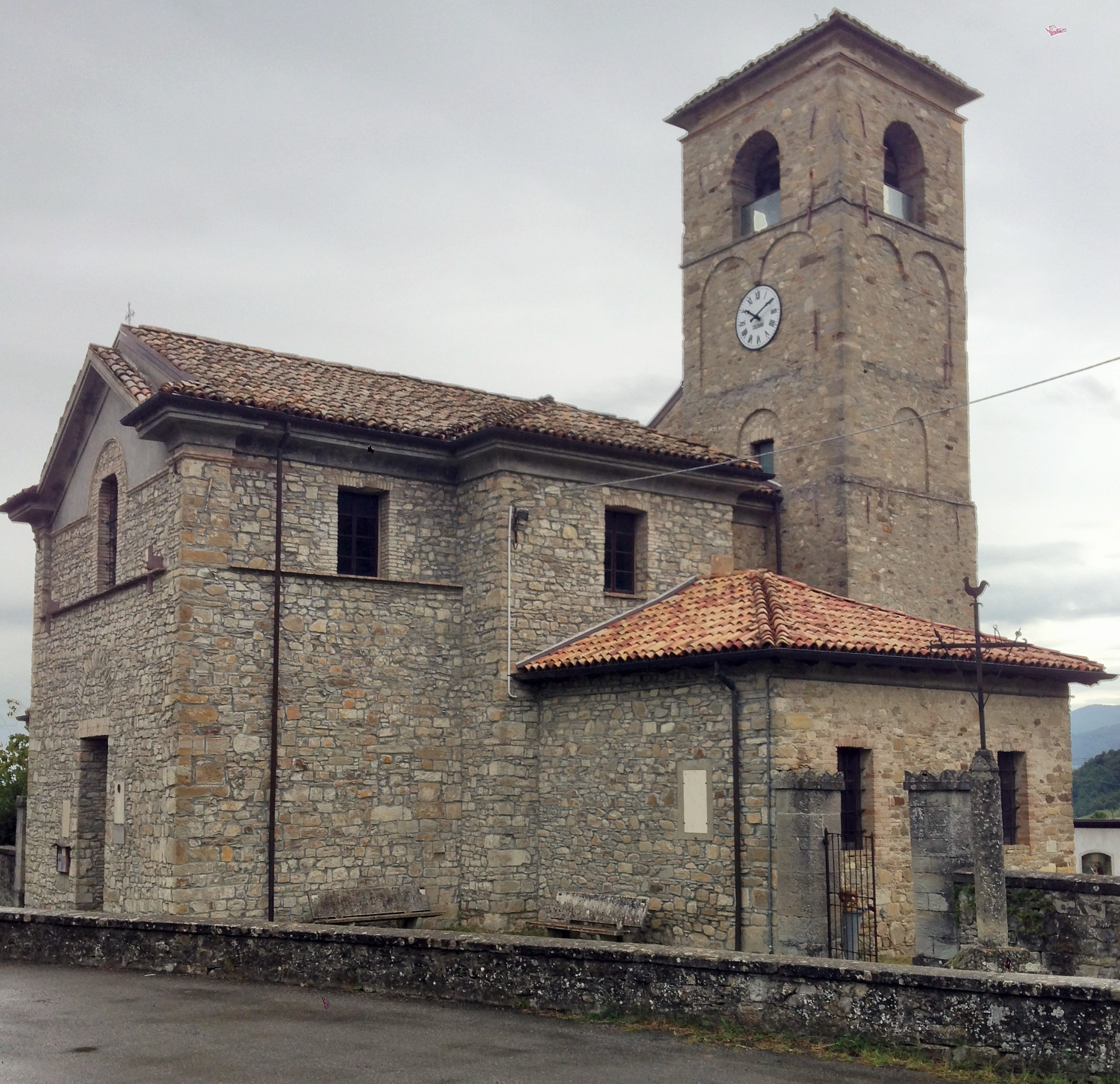 Iglesia entre Fornovo di Taro di Cassio